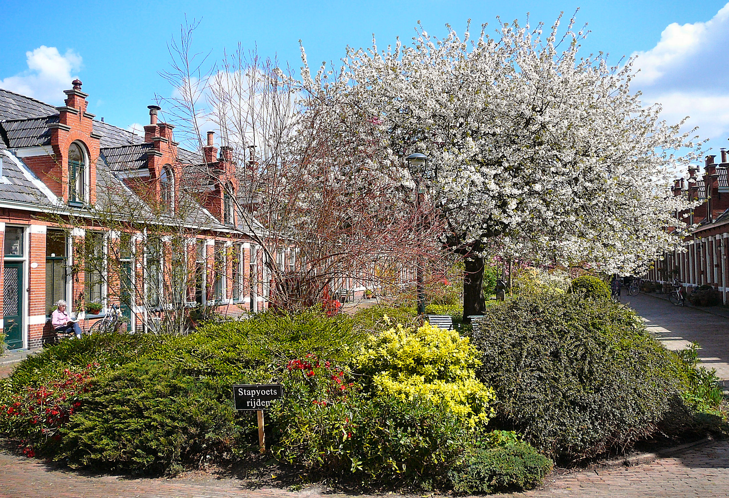 Deel Typografengasthuis.